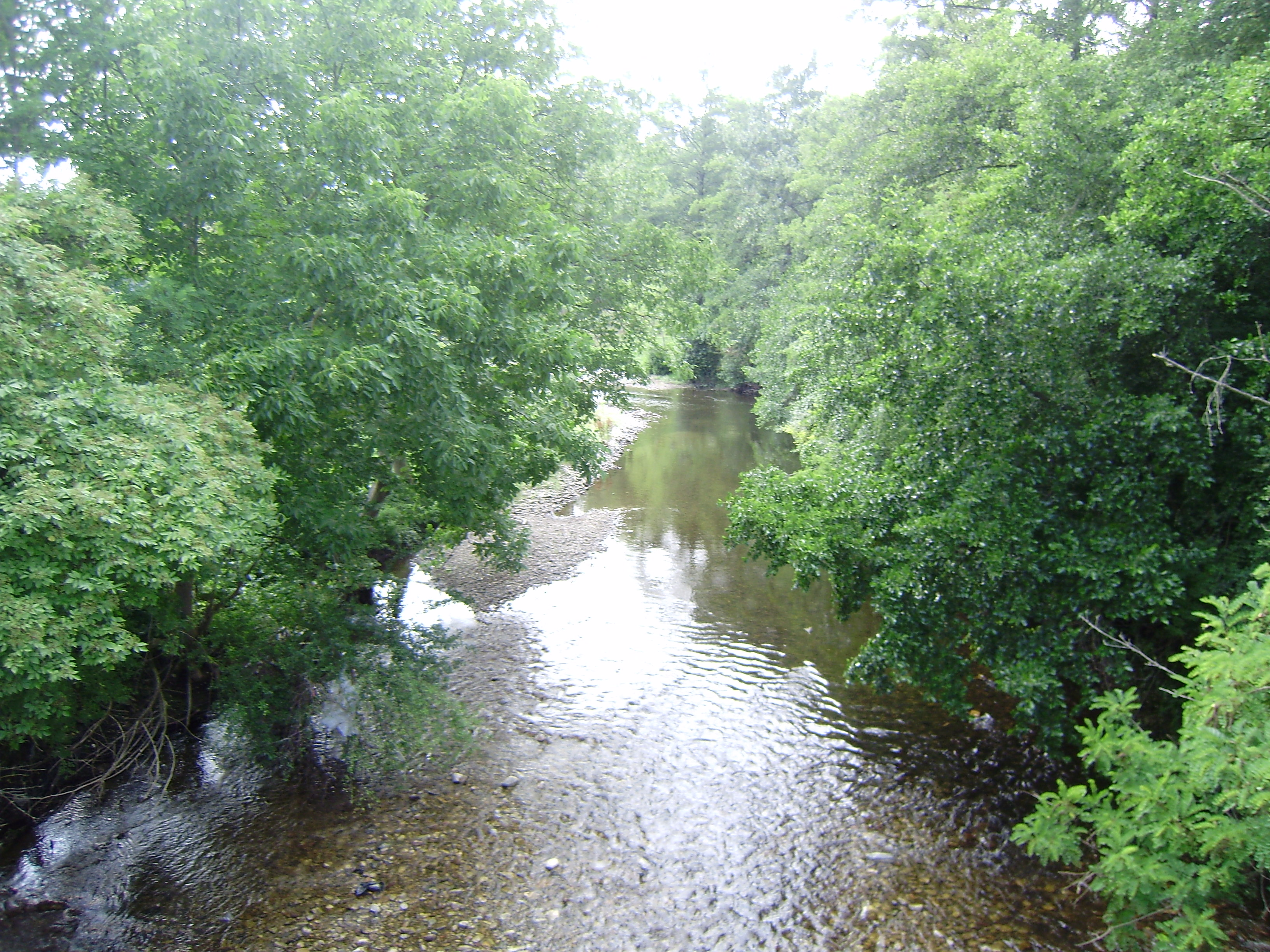 Стакевска река в село Чифлик, област Видин.